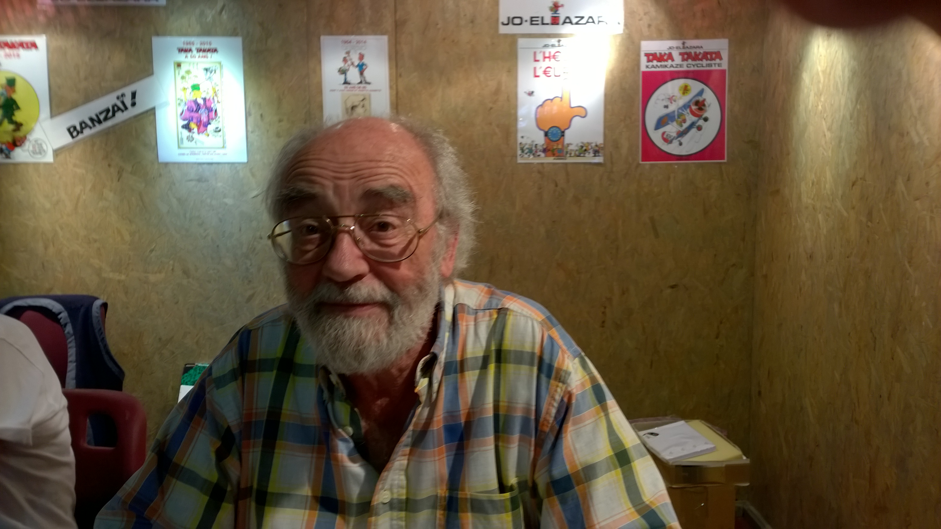 Le dessinateur belge Jo-El Azara le 28 juin 2015 lors du festival BD A D'OC à l'Isle-Jourdain.